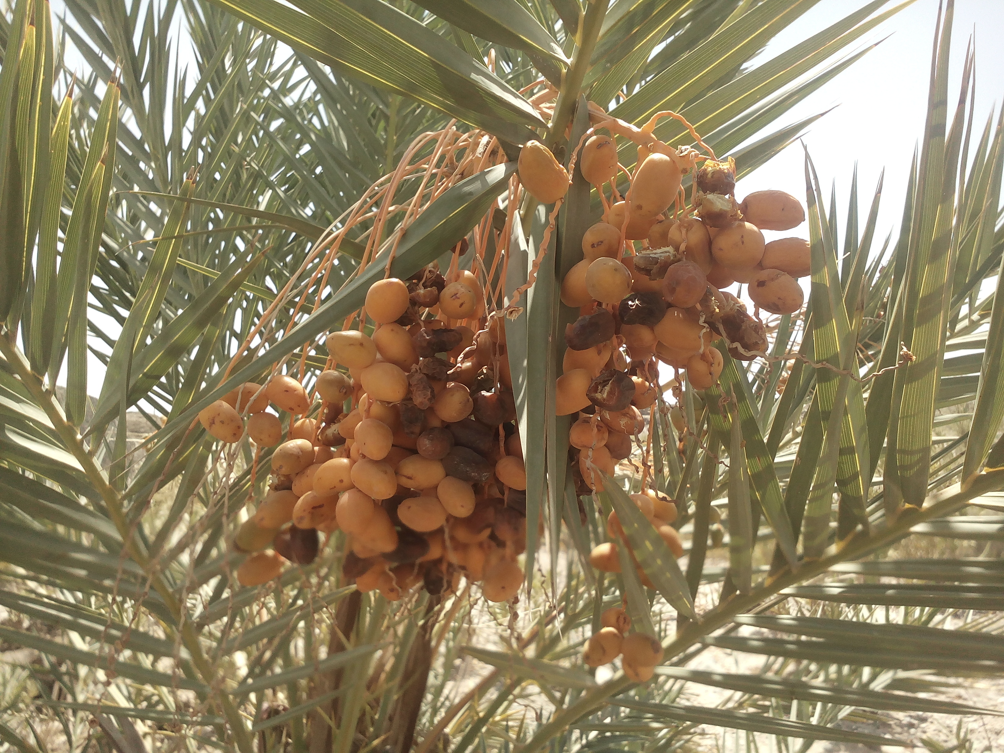 Kharan Tehsil, Pakistan